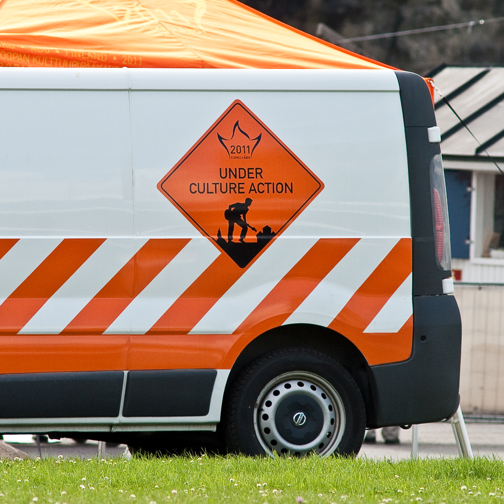 under culture action